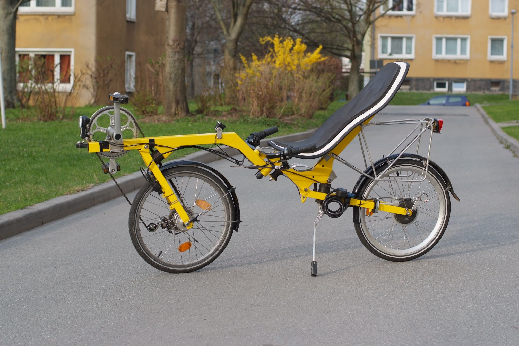 Flevobike